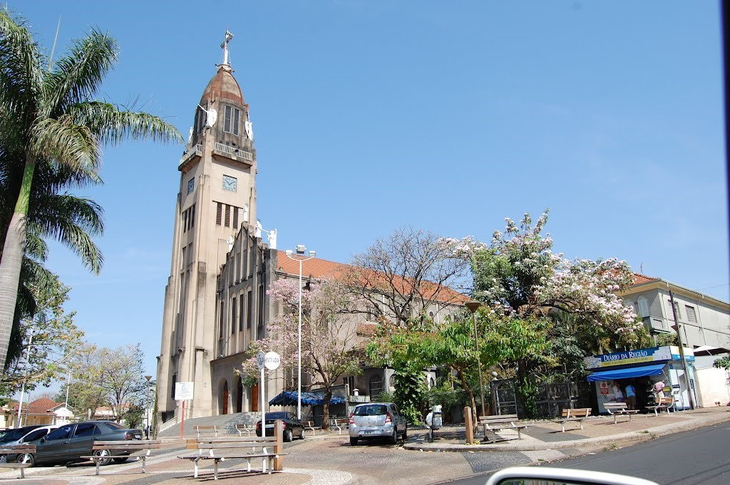 Basilica menor de nossa senhora aparecida